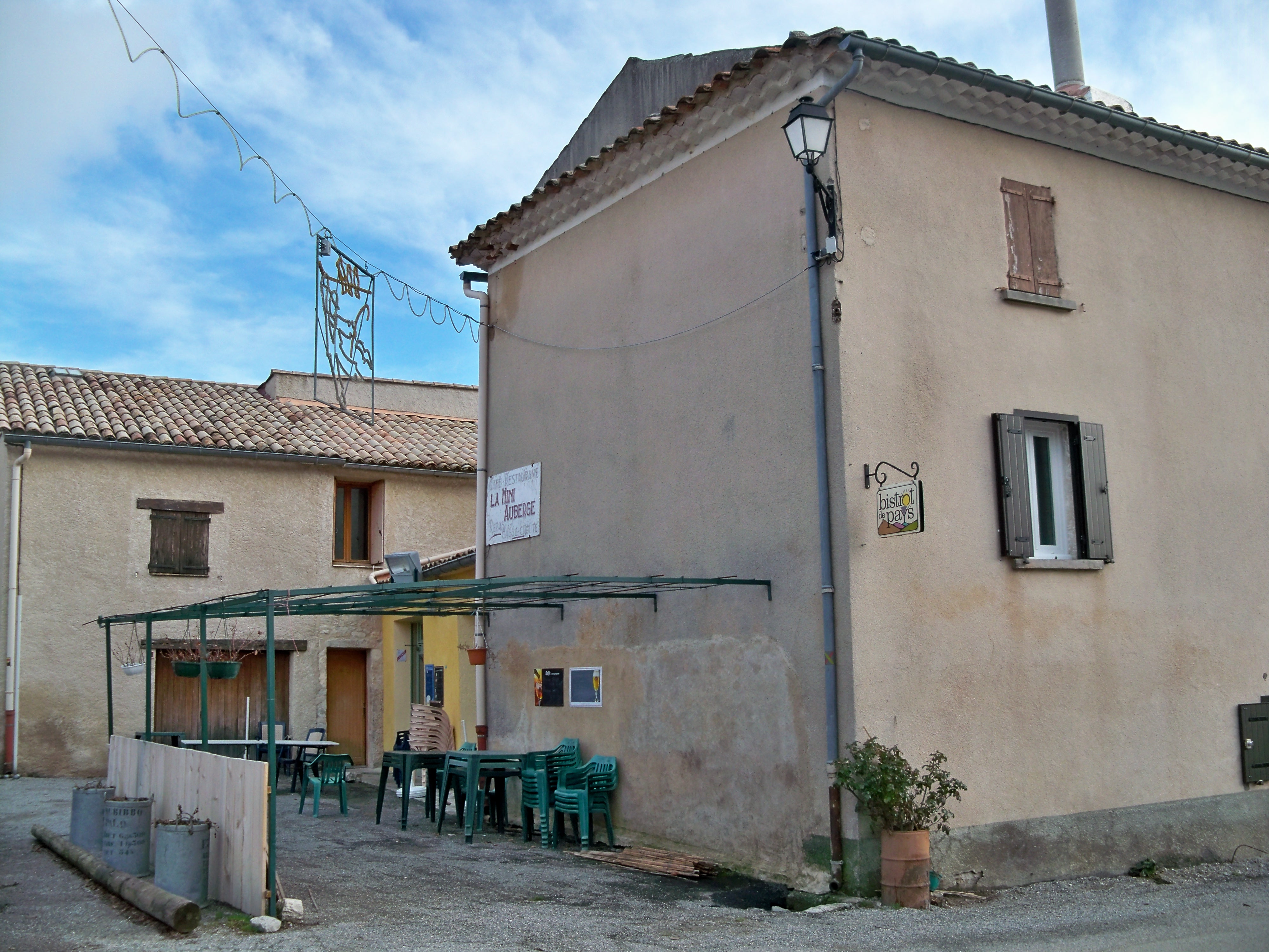 Bistrot de Pays de Saumane (04) France